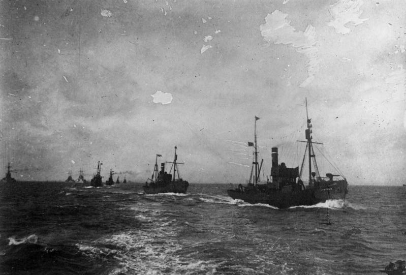 Auslaufende Vorpostenflottille 1. Weltkrieg, Seestreitkräfte im Verband oder Hafen; Auslaufende Vorpostenflottille